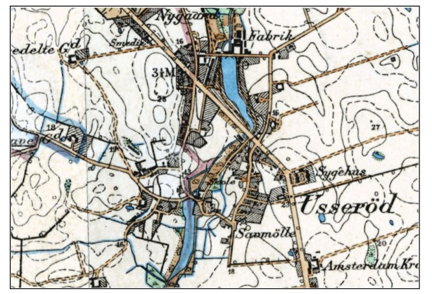 Usserød1898